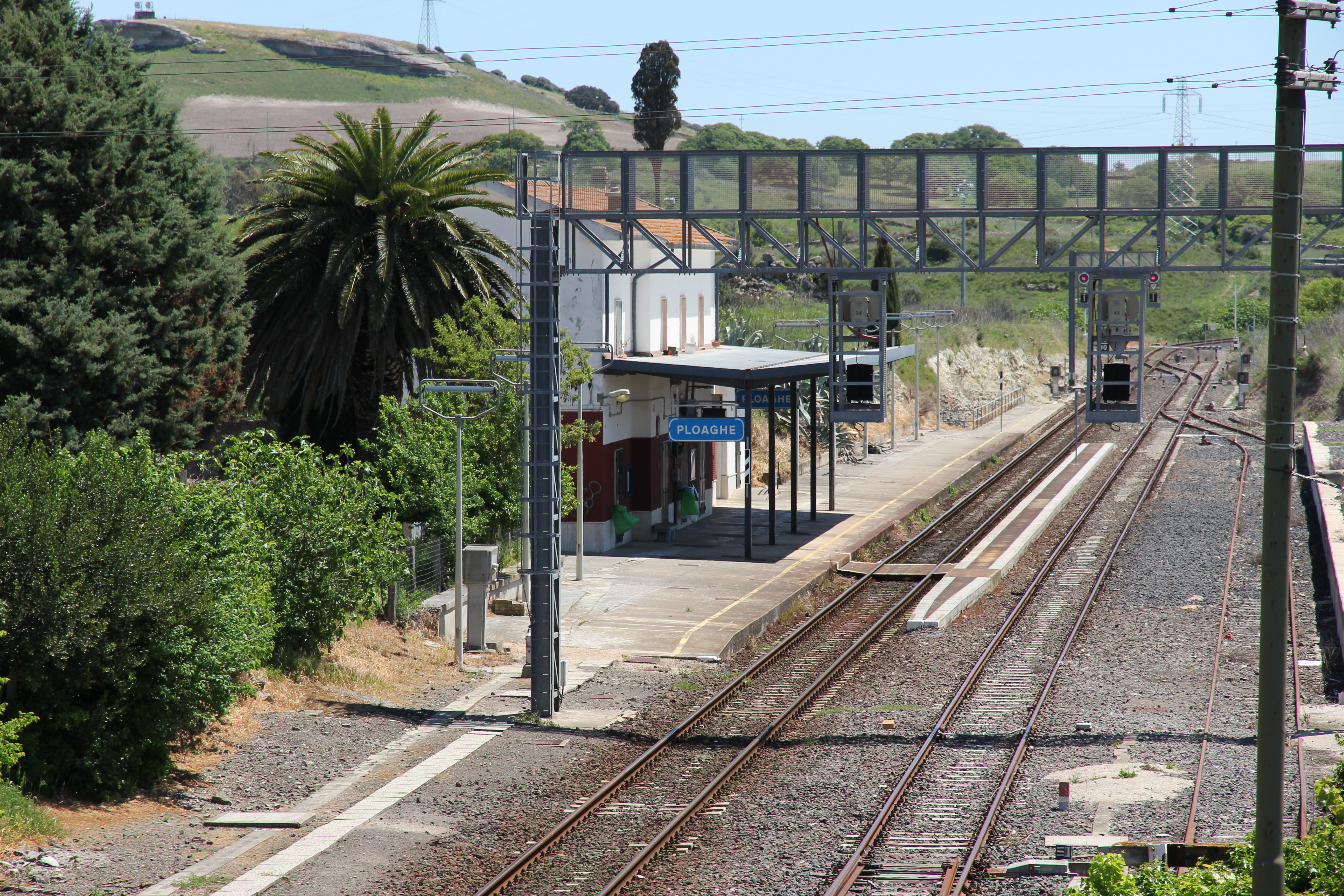 Ploaghe - Stazione ferroviaria